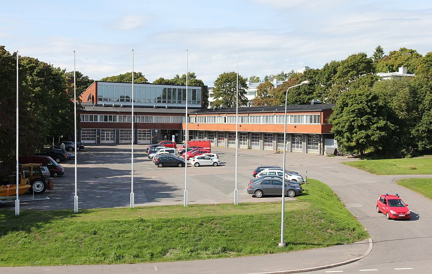 Haagan pelastusasema Helsingin Etelä-Haagassa. Huom: Muista säilyttää viittaus kuvaajaan, mikäli käytät kuvaa.